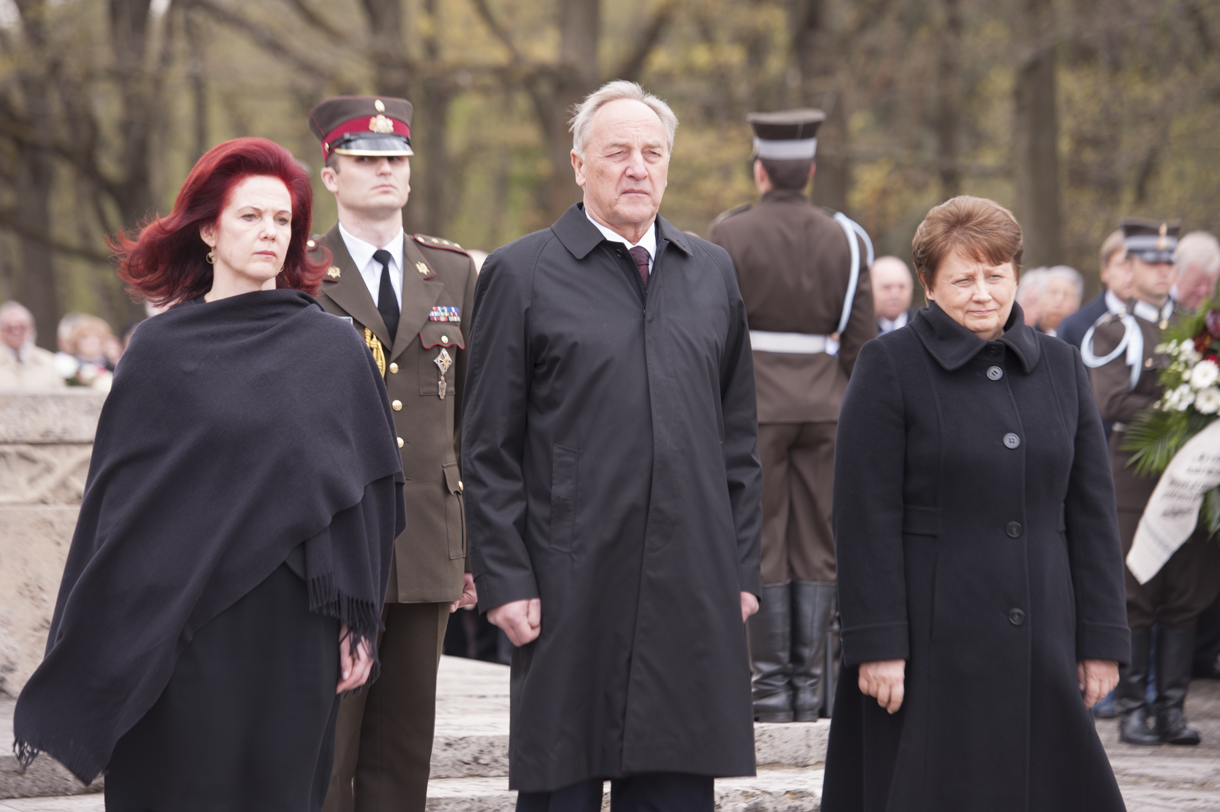 Āboltiņa, Bērziņš, Straujuma